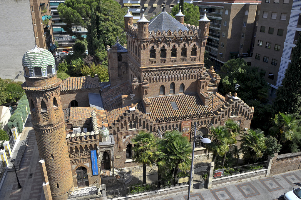 Palacete o Palacio Laredo. Universidad de Alcalá. Alcalá de Henares.